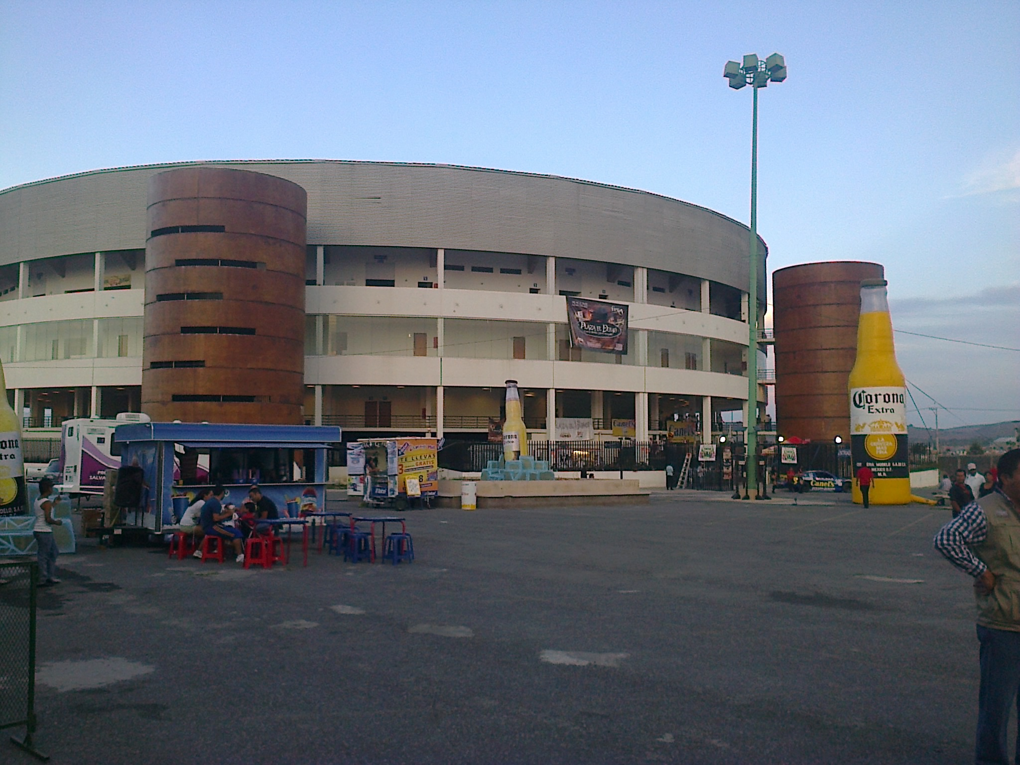 "El Domo San Luis", localizado en las instalaciones de la Feria Nacional Potosina FENAPO.